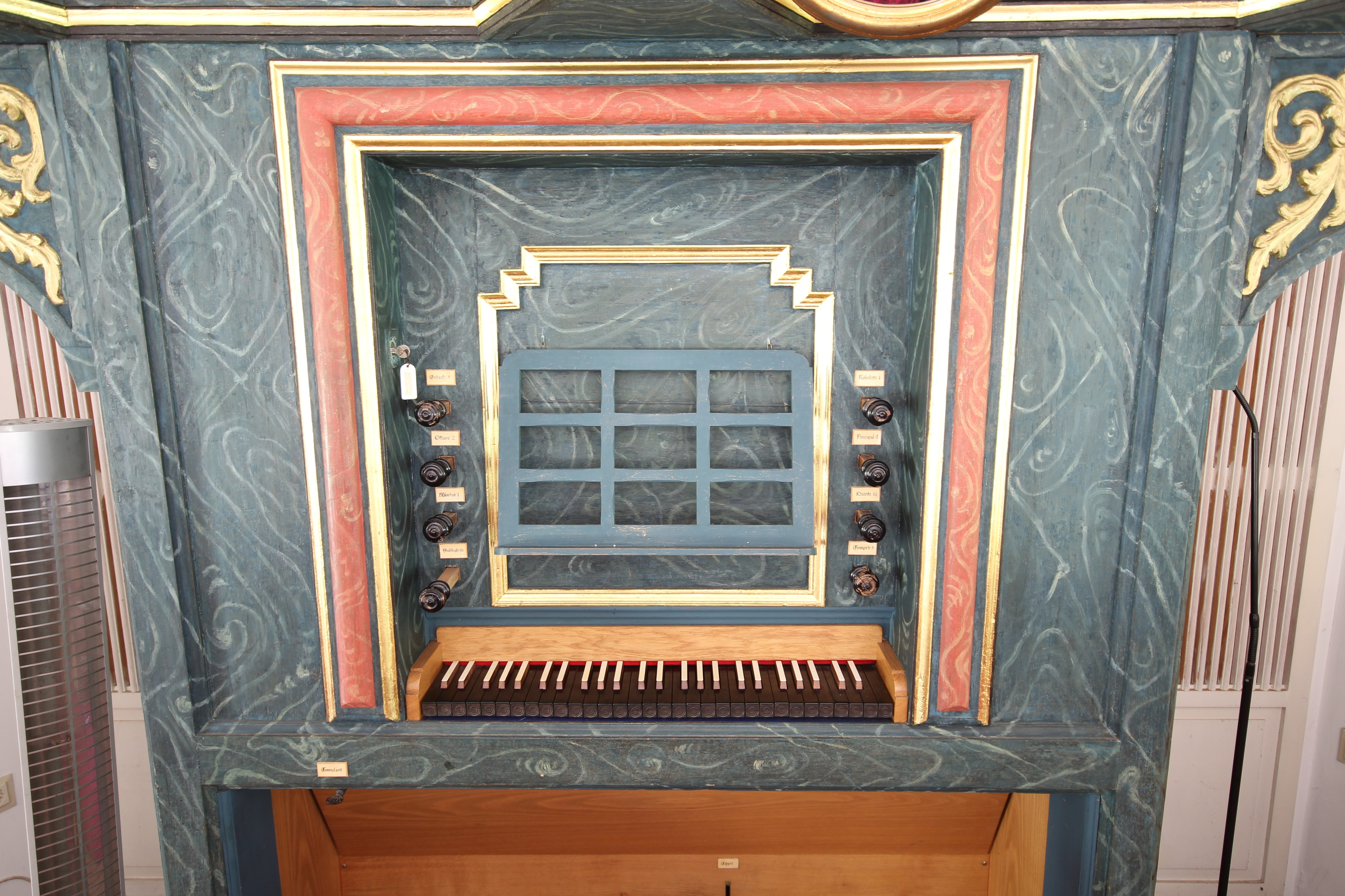 Spielanlage der Orgel der evangelischen Kirche zu Solms-Albshausen (Gehäuse und Windlade des Manuals von Georg Philipp Dreuth um 1750, sämtliches Pfeifenwerk von Günther Hardt, 1982)